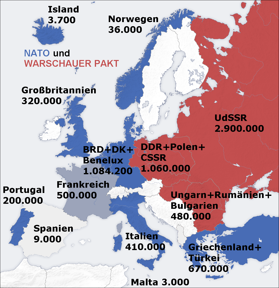 Truppenstärke der NATO-Mitgliedsstaaten in Europa und der Staaten des Warschauer Paktes Anfang 1973. Truppenstärke der NATO-Staaten inkl. Kontingente aus den USA und Kanada. Miteingerechnet wurden auch die 9.000 in Spanien (Nicht-NATO-Mitglied) stationierten US-Soldaten.